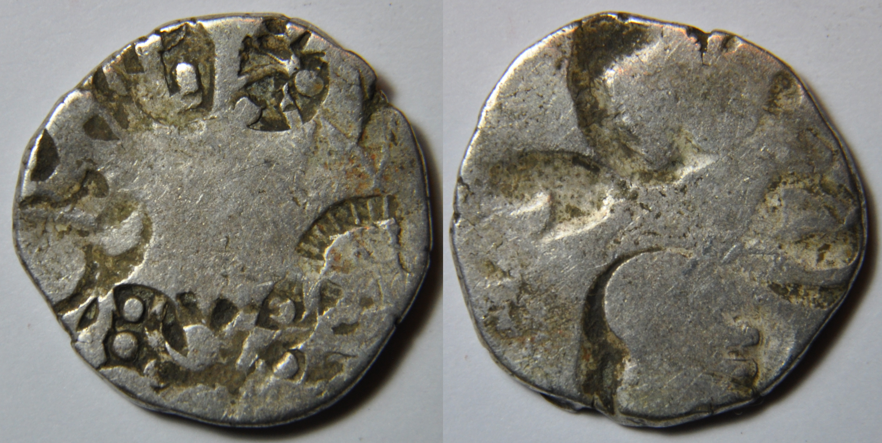 Une monnaie en argent de 1 karshapana de l’empire du Magadha (ca 600-32 BC), roi Mahapadma Nanda ou ses fils (ca 346-321 BC) A/ différents symboles R/ différents symboles dont un éléphant. Dimensions : 17 mm Poids : 2.5 g. Pas de référence Coins of rulers of India A silver coin of 1 karshapana of the Magadha Empire (ca 600-32 BC), King Mahapadma Nanda or his sons (ca 346-321 BC) A / different symbols R / different symbols including an elephant. Dimensions: 17 mm Weight: 2.5 g.